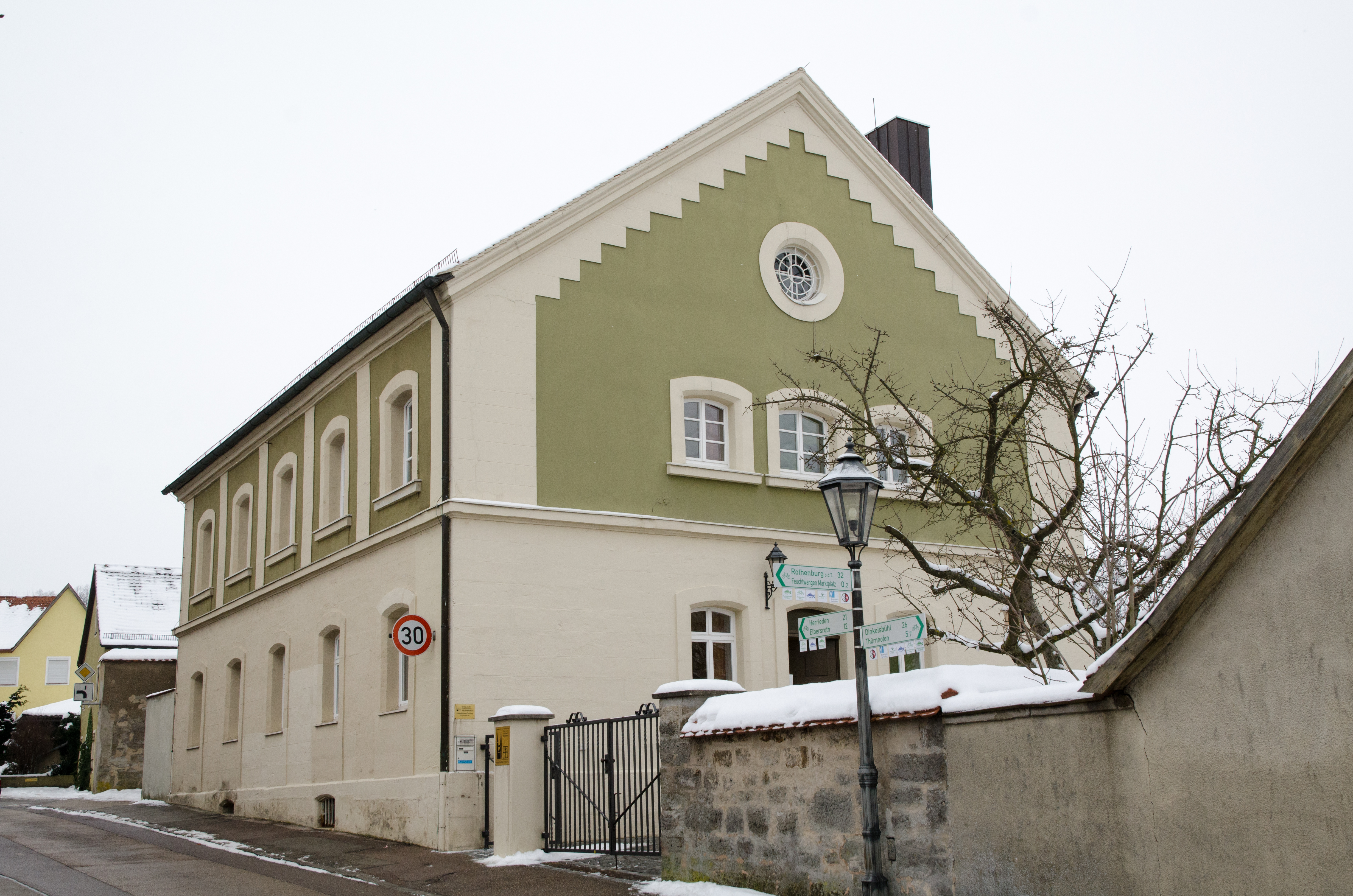 Feuchtwangen, Ringstraße 66